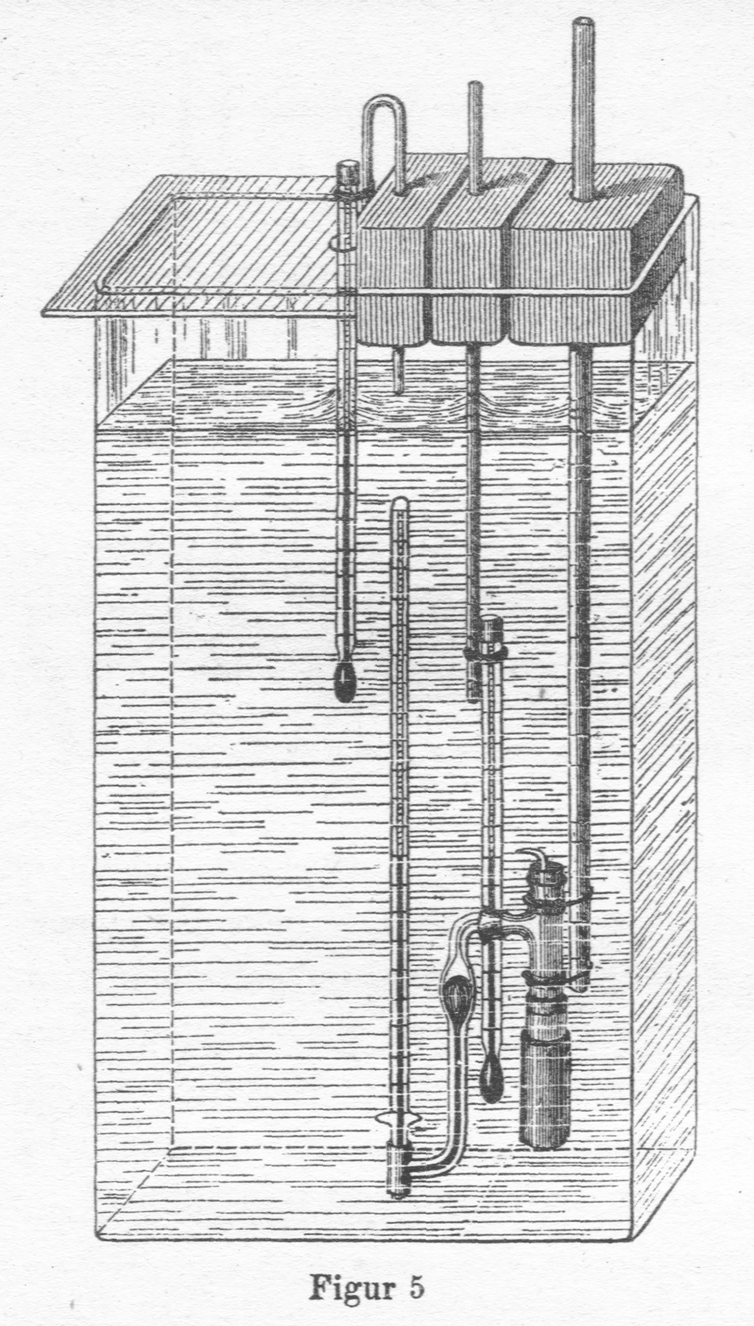 Pfeffersche Zelle (engl. Pfeffer Cell) closed apparatus